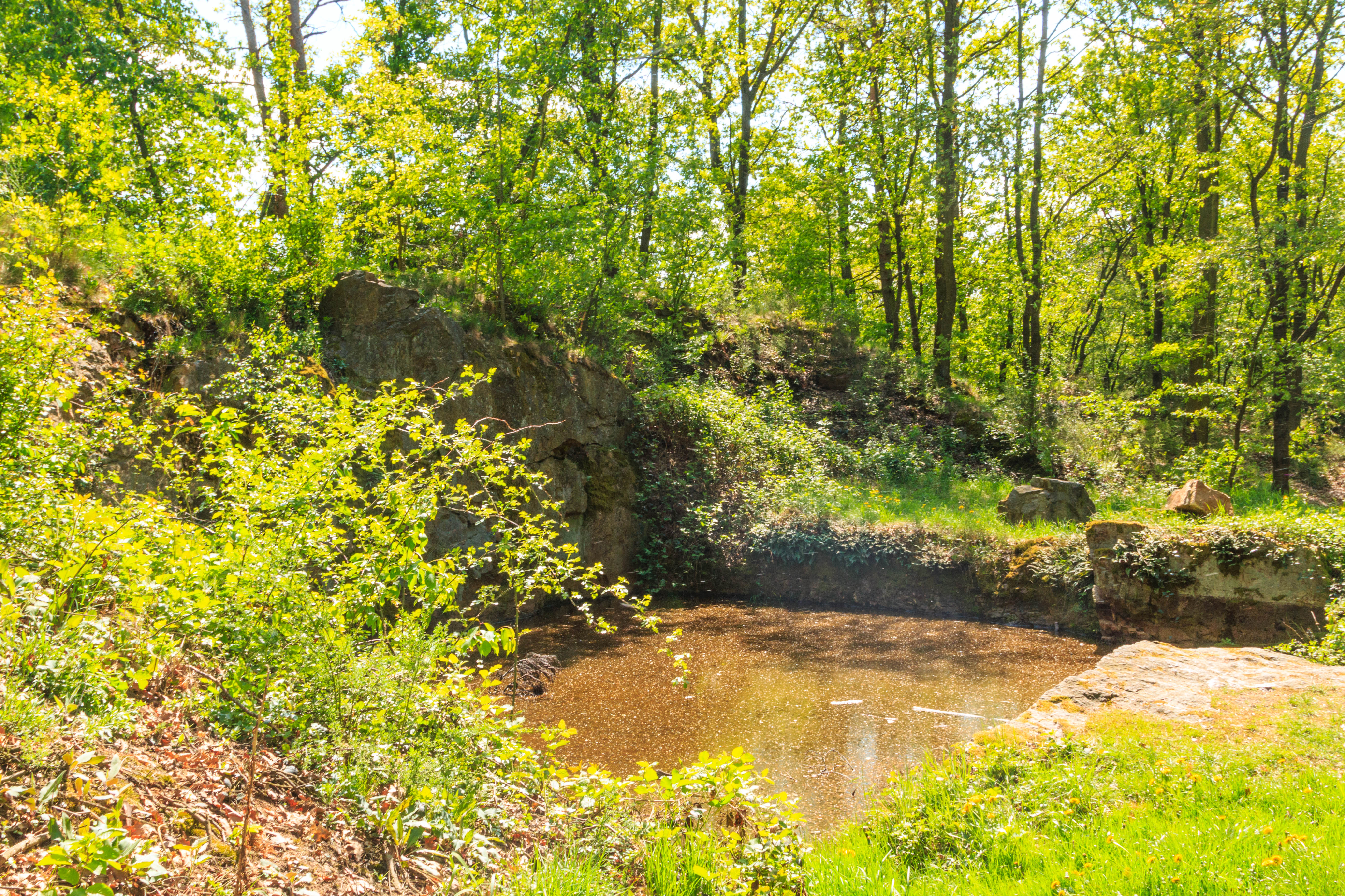 Lom Bezedná u Horních Raškovic Project: Vodstvo.